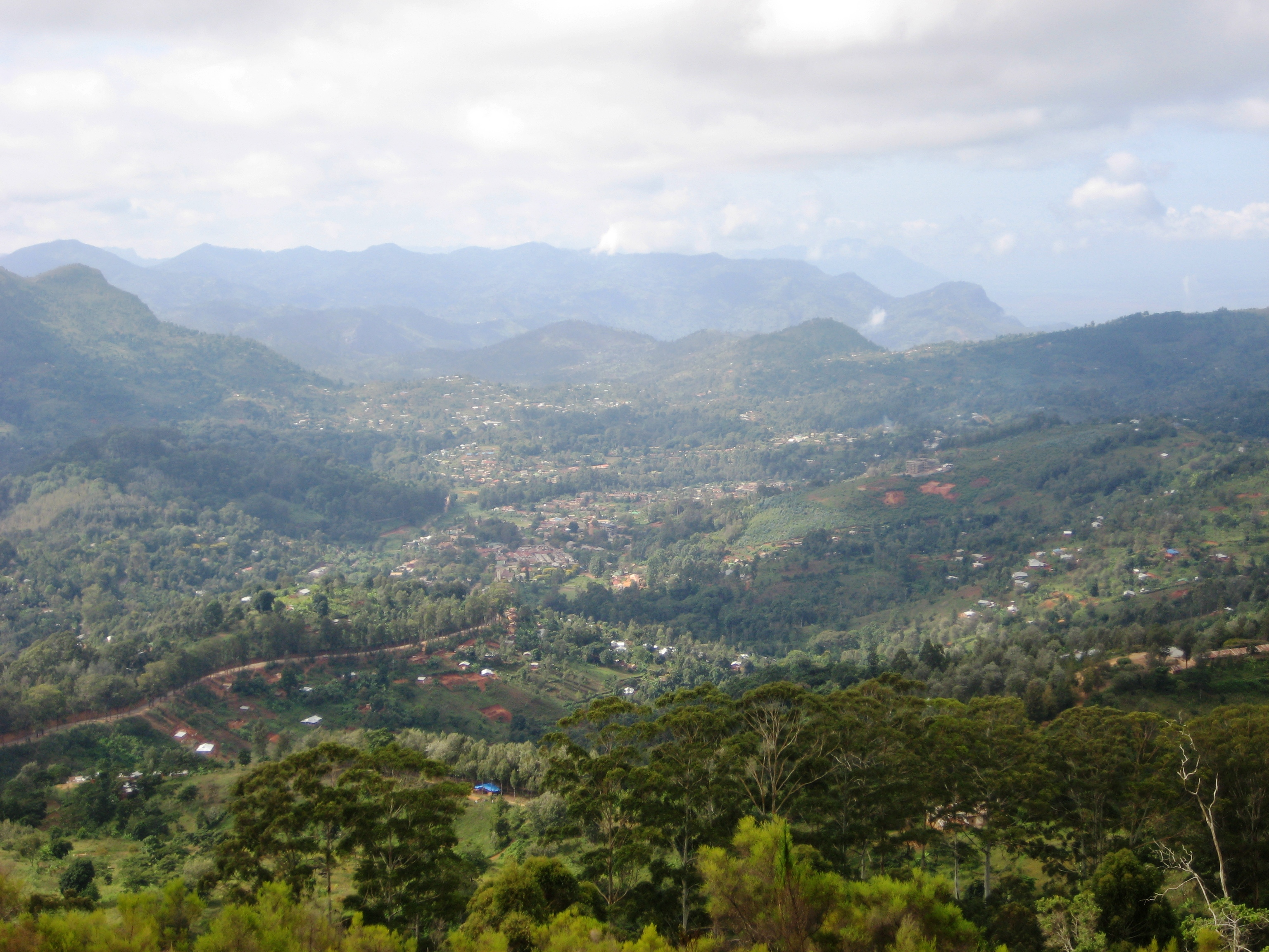 Panorama di Lushoto (Regione di Tanga, Tanzania settentrionale)